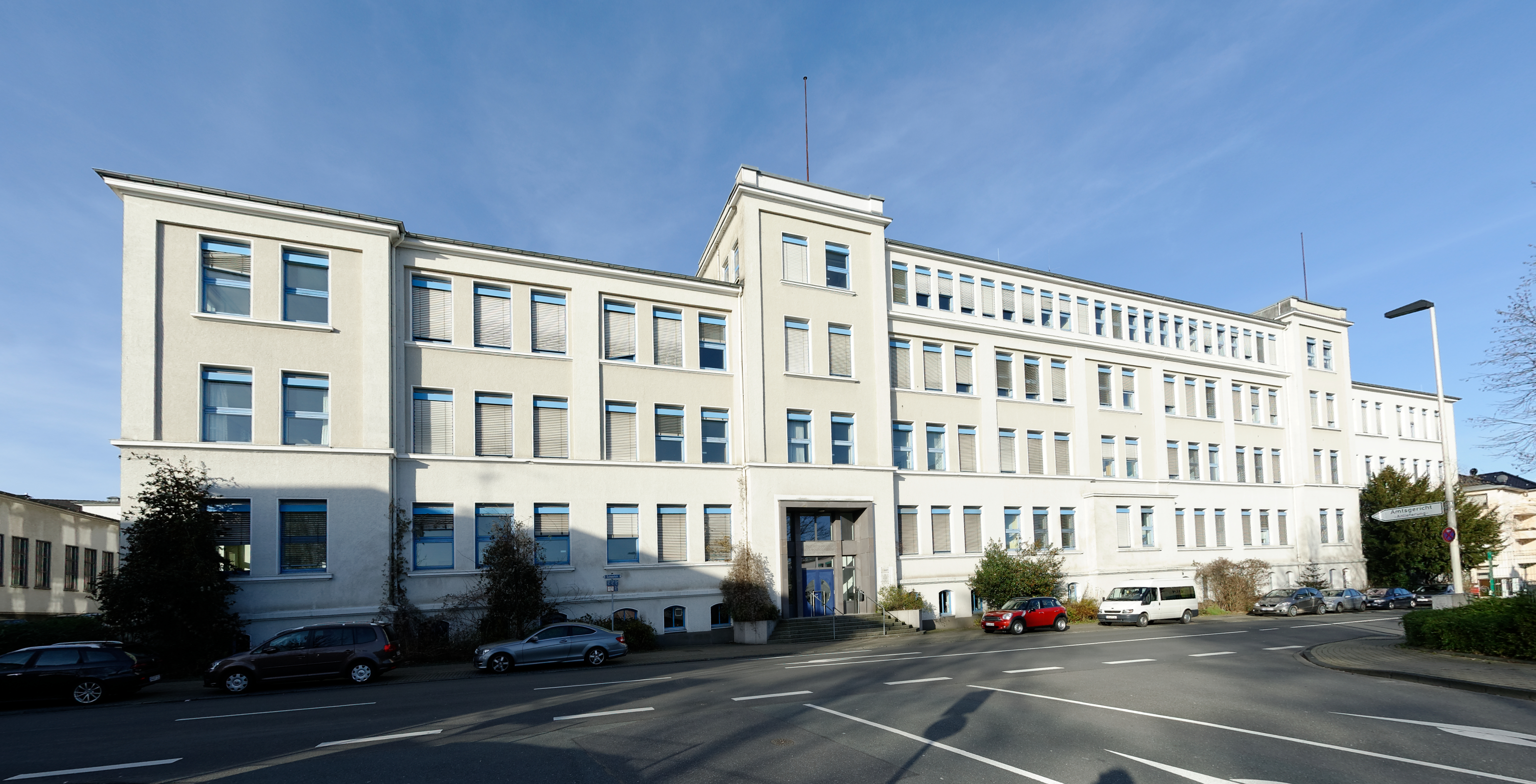 Solingen Schule Schwertstraße.jpg